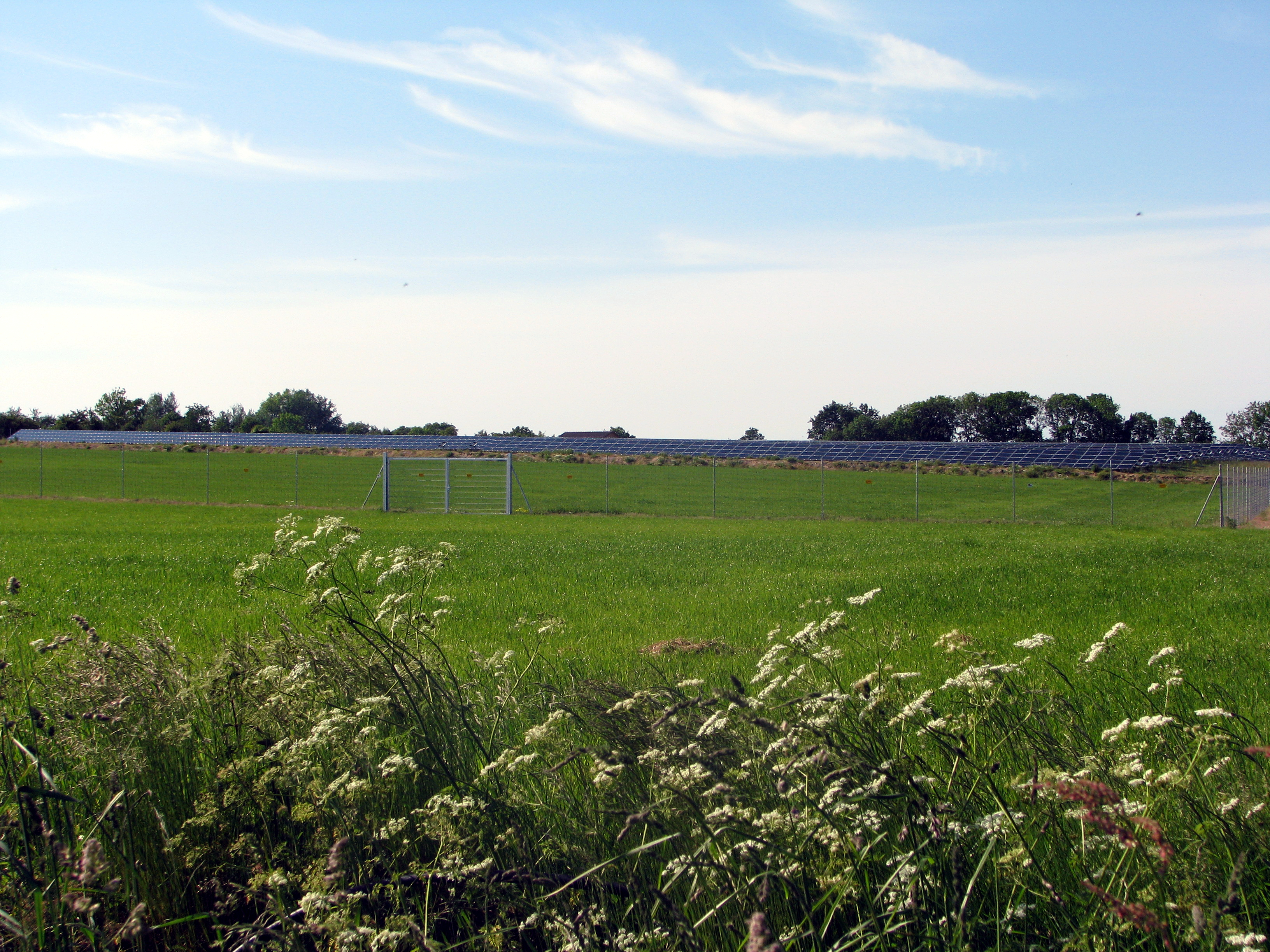 Ein Solarfeld in der Gemeinde Högel, Kreis Nordfriesland